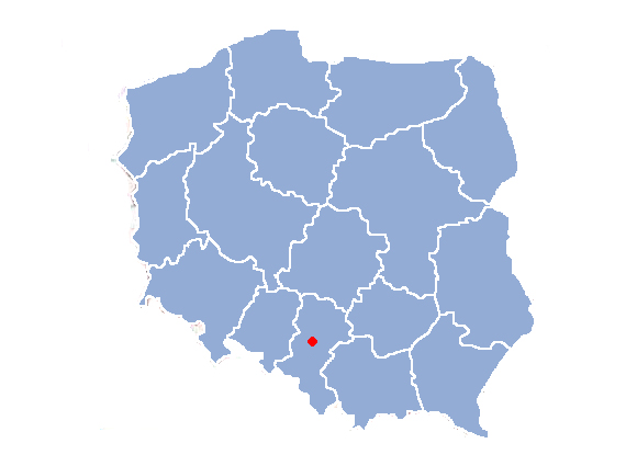 Image:Swietochlowice Mapa.PNG